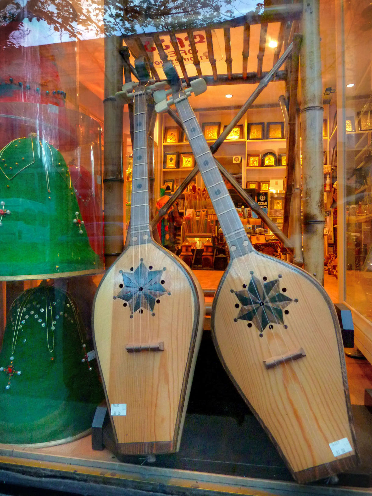 Tbilisi, Panduri Georgia